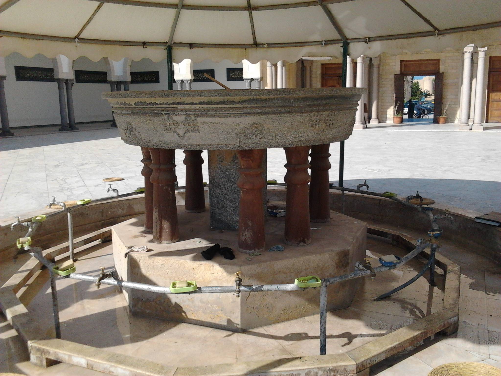 Şadirvan — Mosquée Bourguiba (ou El hanafi) - Monastir